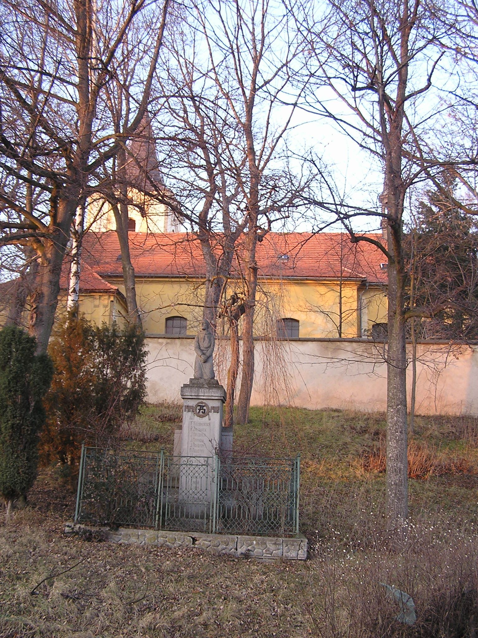 Kostel ve Svatém Poli